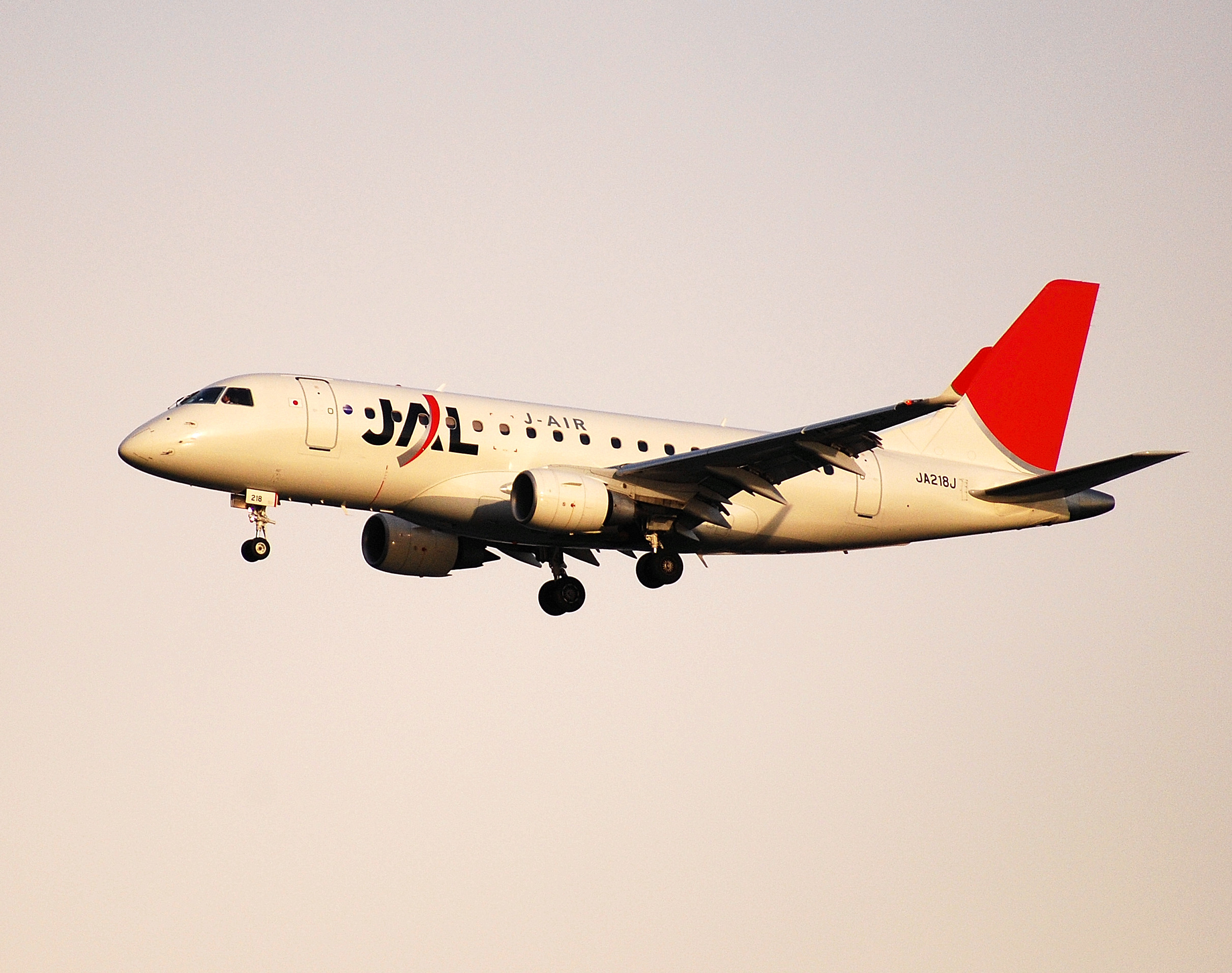 羽田空港に着陸するジェイ・エアのエンブラエル170